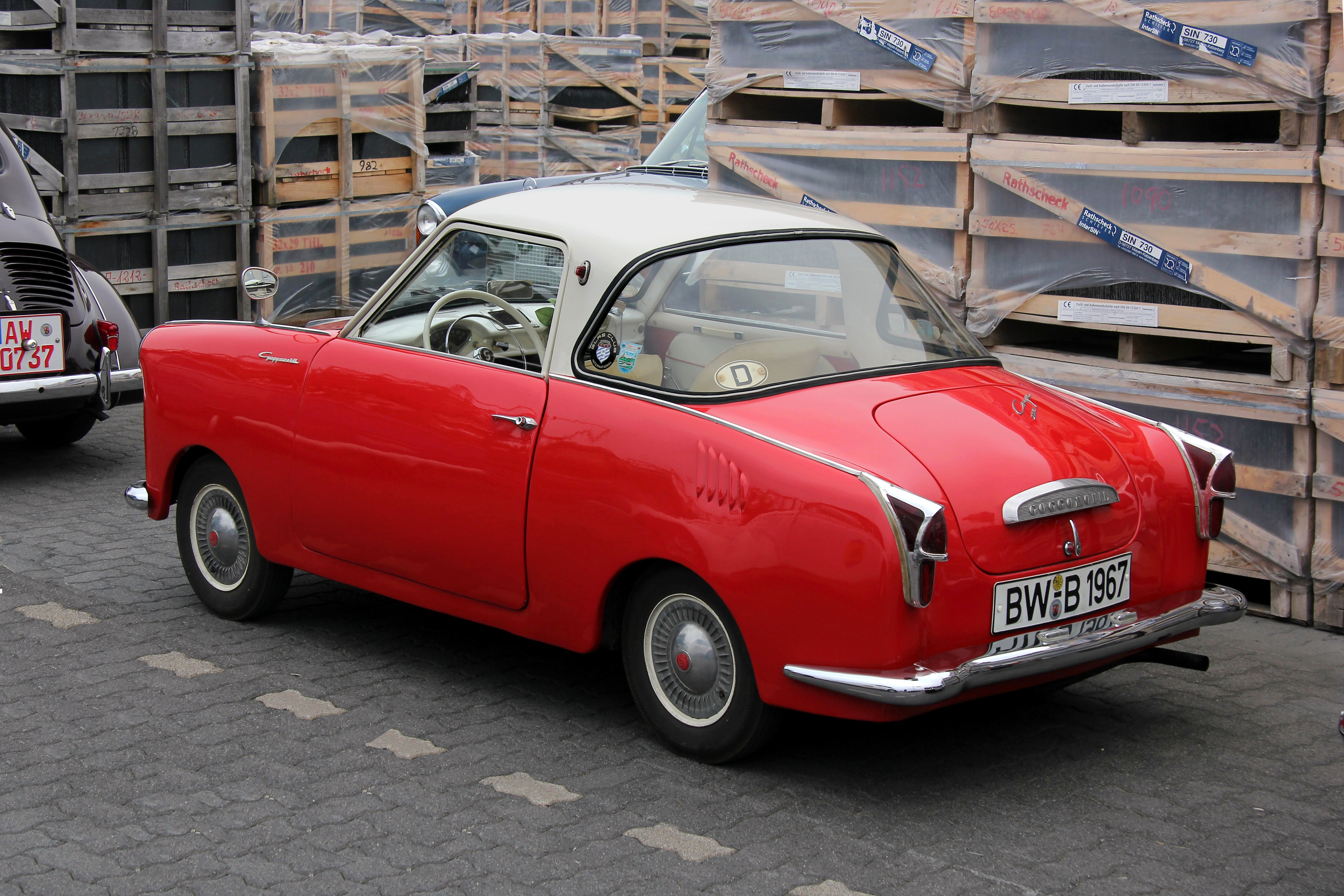 Das Goggomobil-Coupé war ein zweisitziger Kleinstwagen mit Zweizylinder-Zweitakt-Heckmotor, 247 cm³, 13,6 PS bei 5400/min, Länge 3035 mm, Breite 1370 mm, Leergewicht (ohne Fahrer) 480 kg, Höchstgeschwindigkeit 84 km/h; Bauzeit: 1957 bis 1969